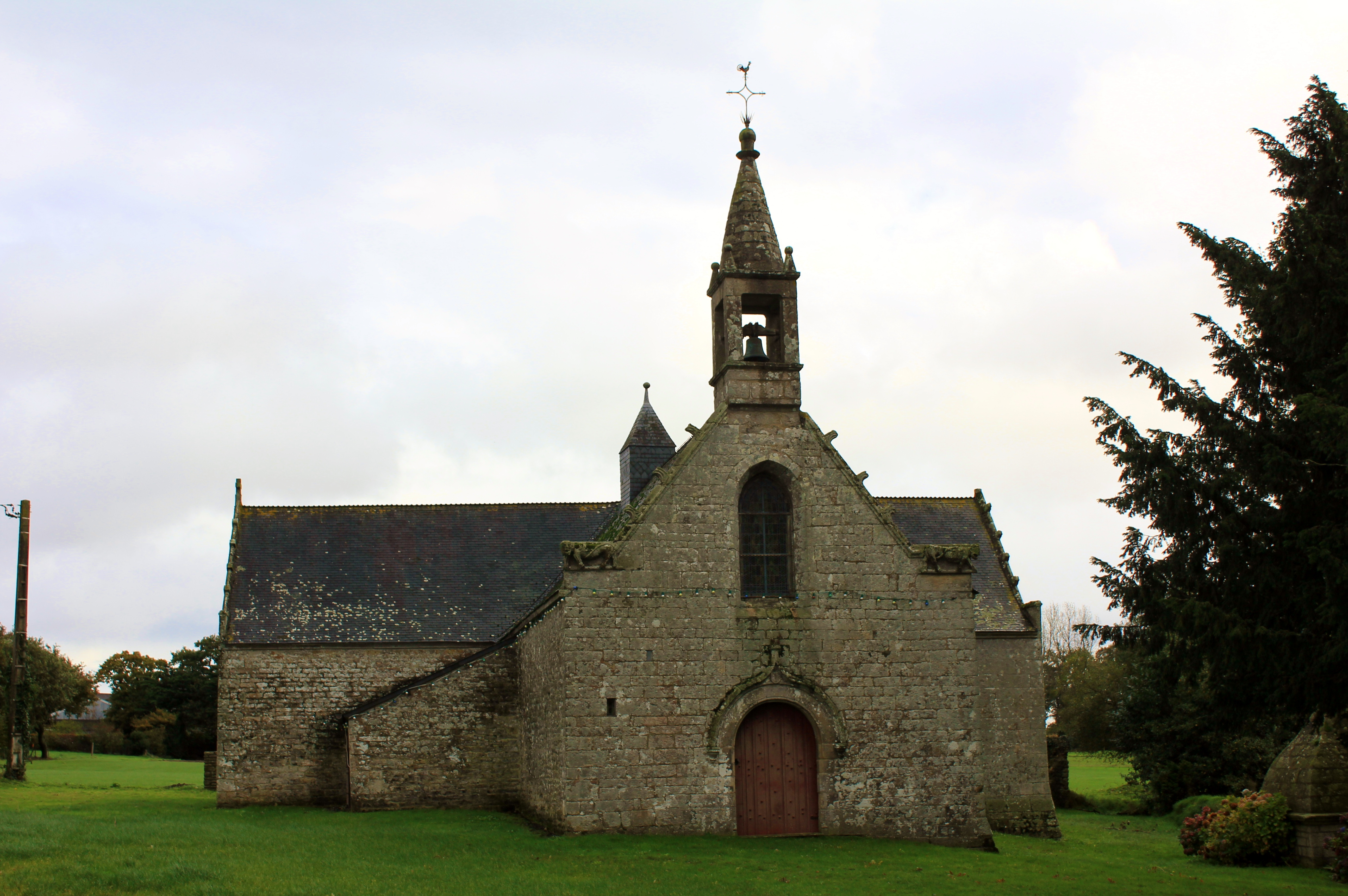 Chapelle Sainte-Anne (Buléon) : vue générale depuis l'ouest